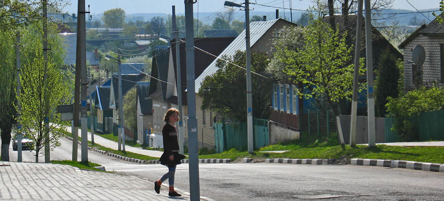 Беларуская (тарашкевіца): У цэнтры Смалявічаў